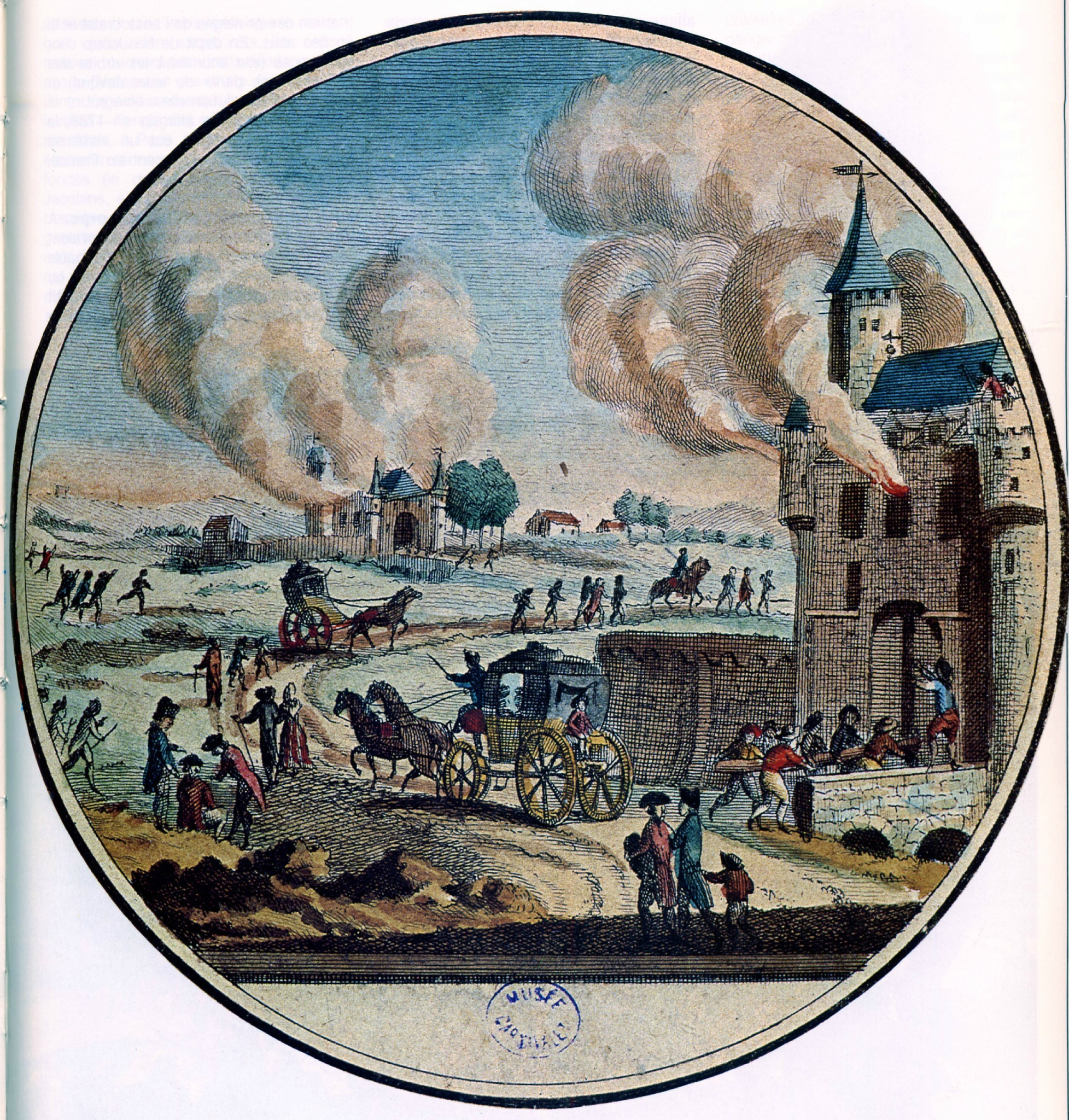 La Grande peur de l'été 1792: émeutes populaires suite à la trahison du roi Louis XVI. Entrée dans la guerre contre les puissances étrangères hostiles à la Révolution, châteaux et abbayes attaqués.